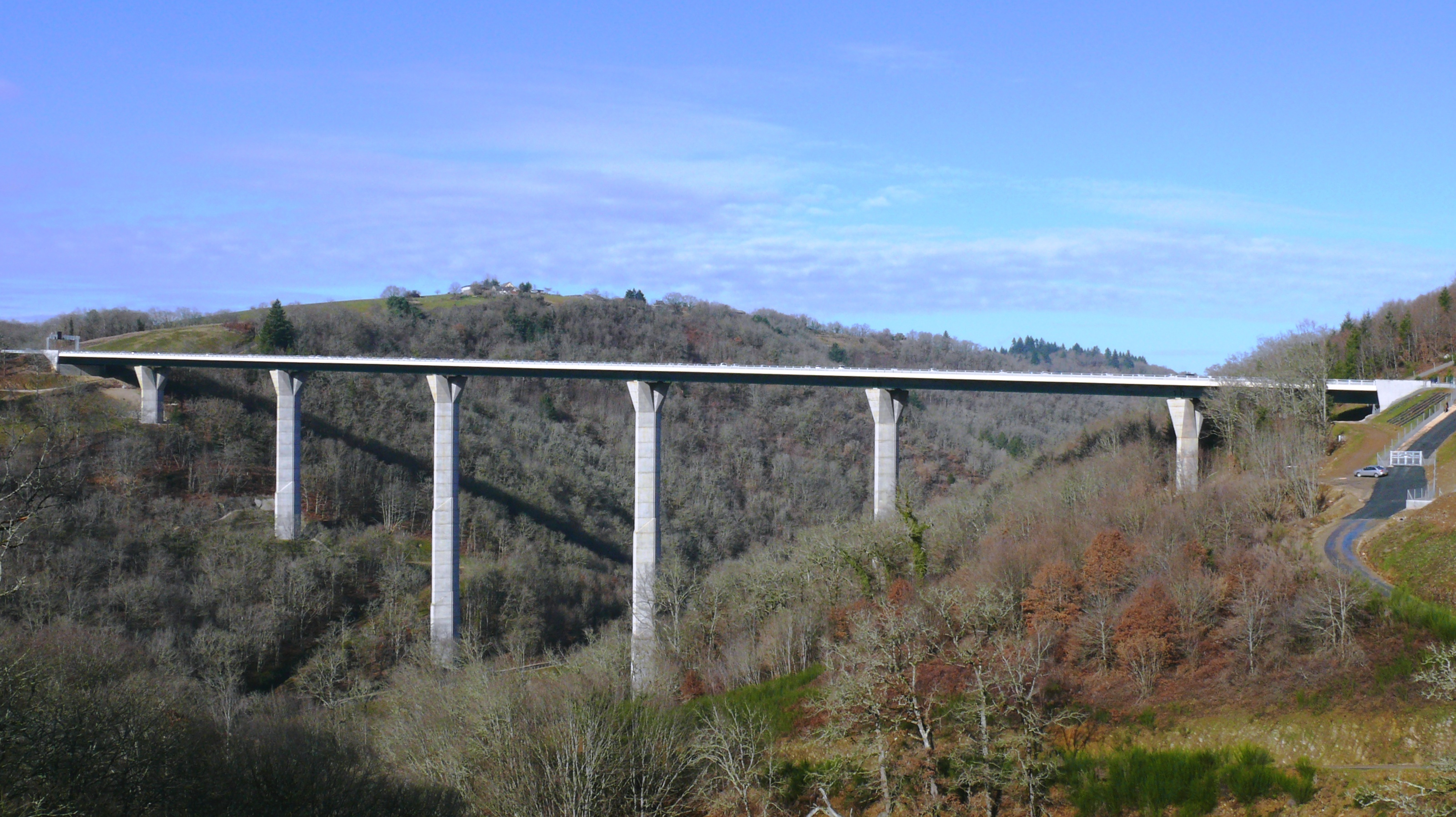 A89 - Viaduc de l'Elle le jour de l'inauguration